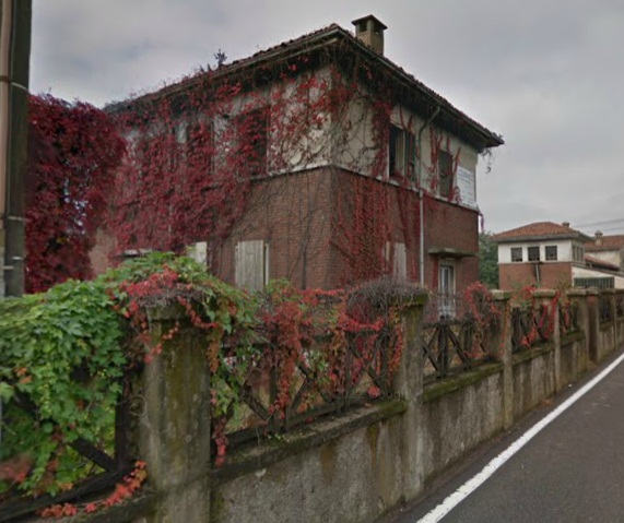 L'edificio dell'ex centrale ENEL a Castellazzo de' Stampi, Corbetta (MI) - Italy